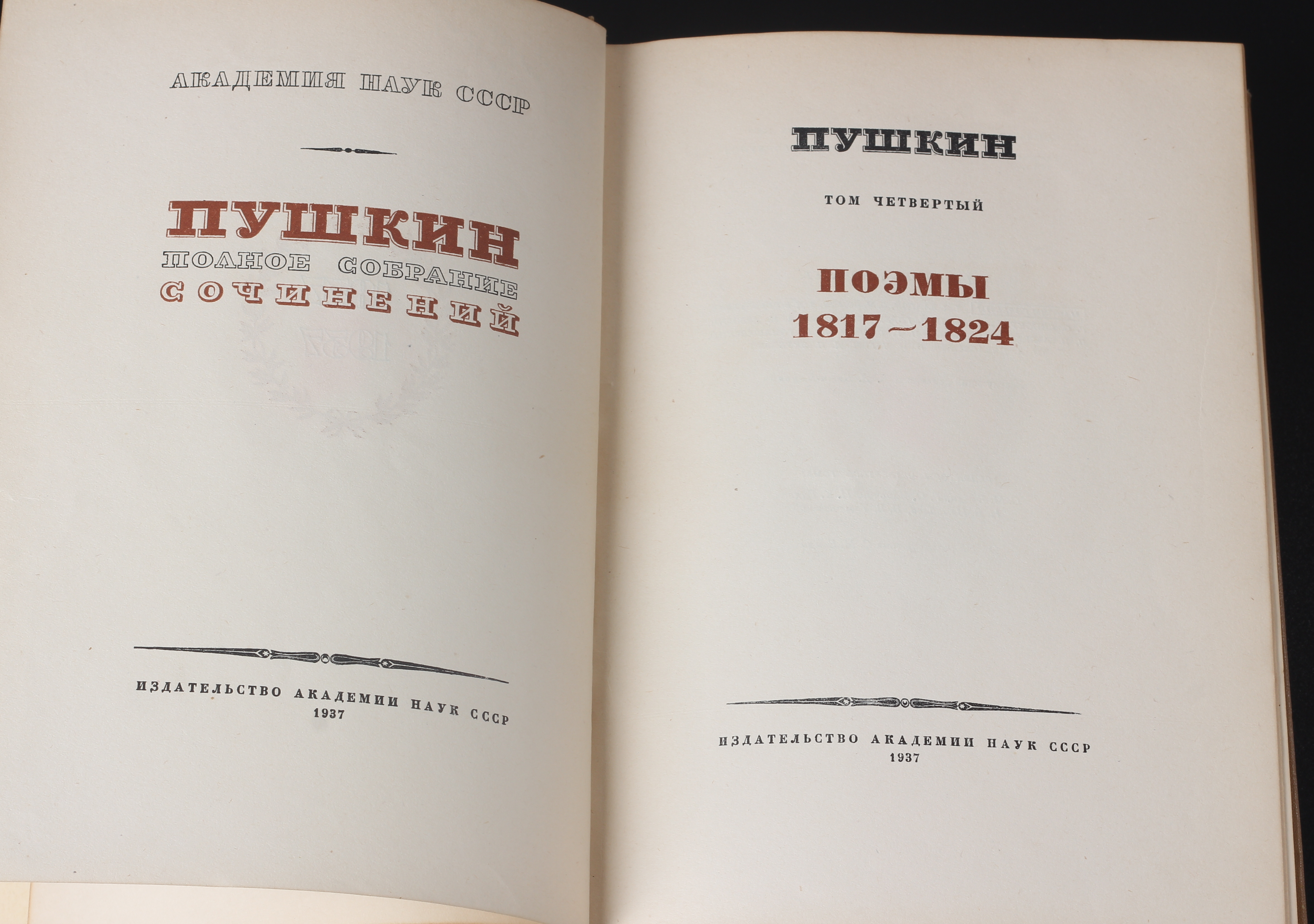 Полное академическое собрание сочинений Пушкина. том 4